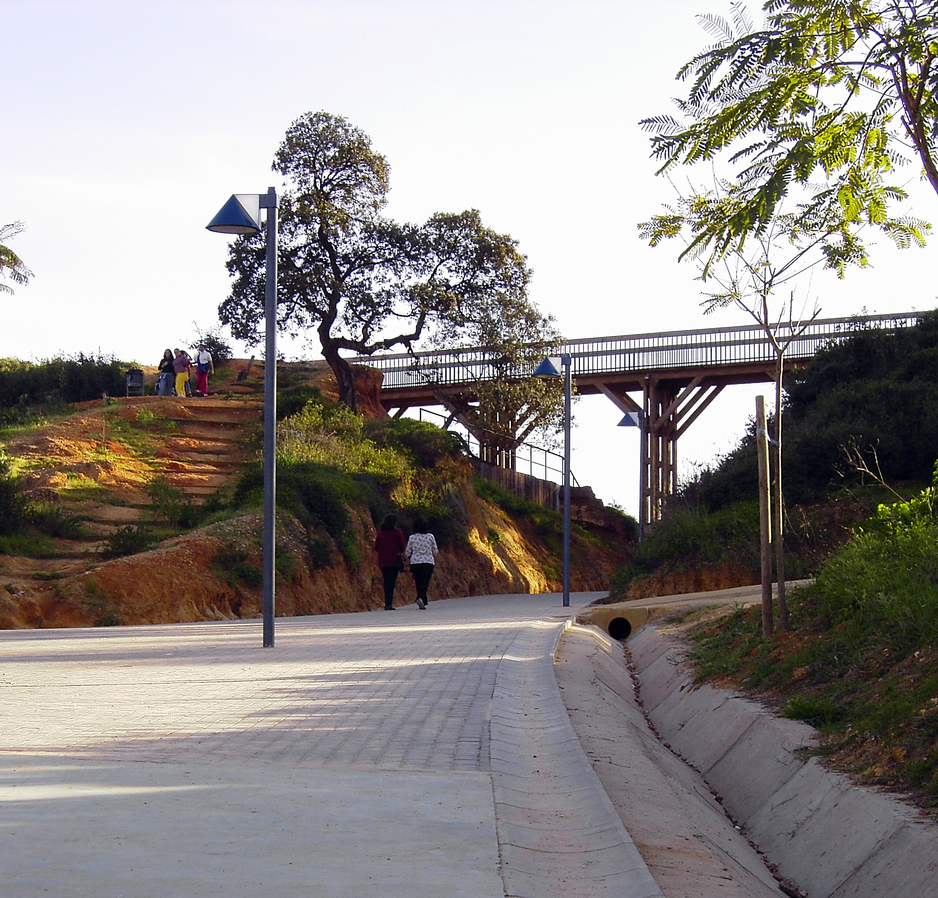 Parque Moret de Huelva